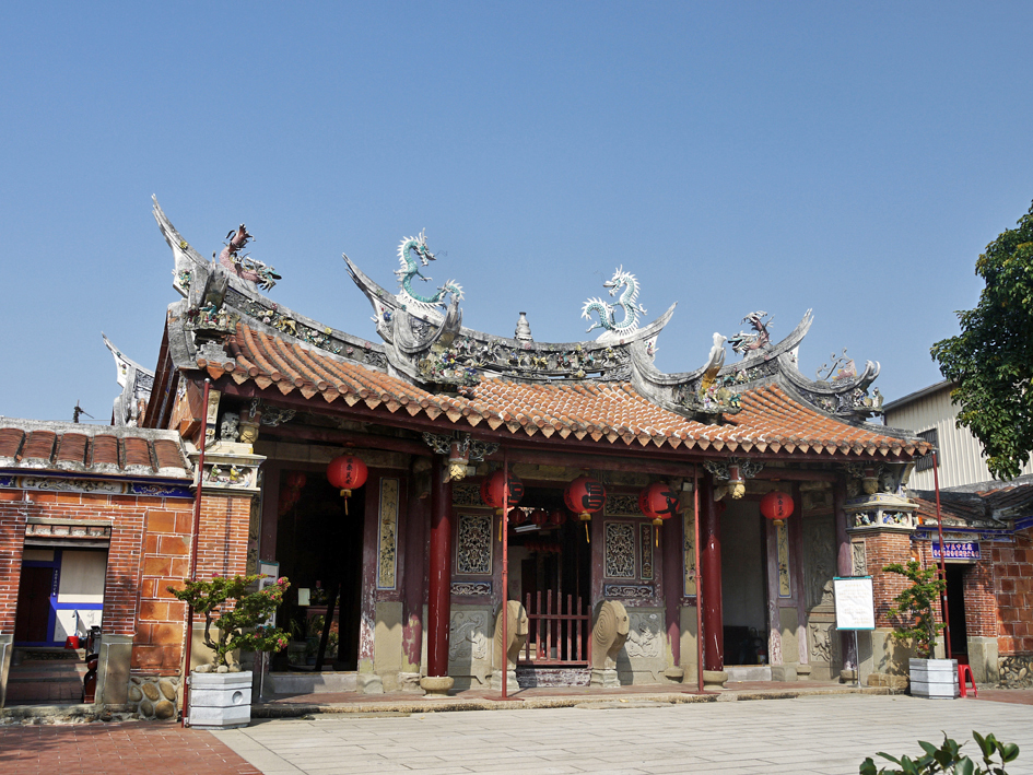 中文（台灣）: 大甲文昌祠。